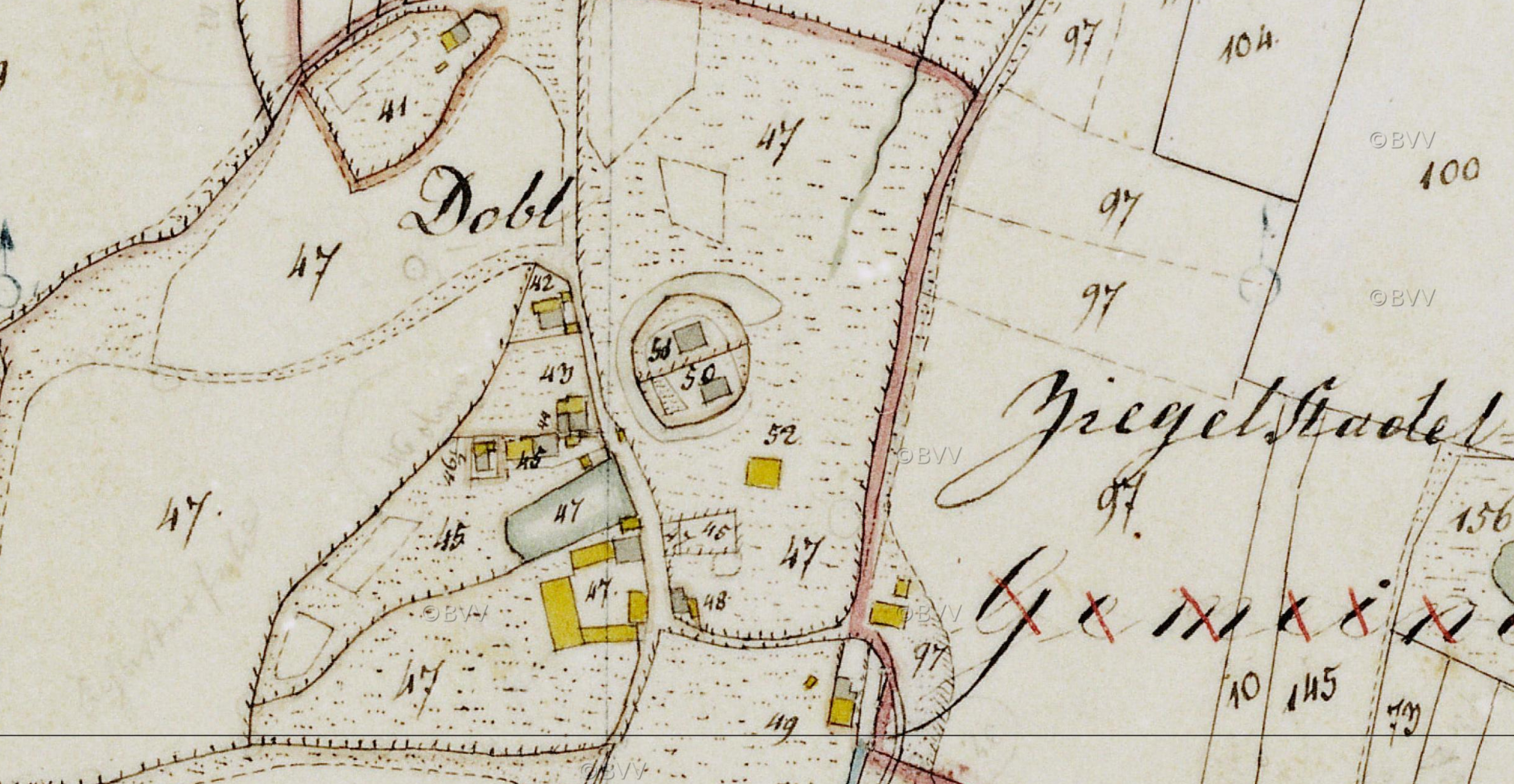 Ansicht des Turmhügels Dobl in der Bayerischen Uraufnahme